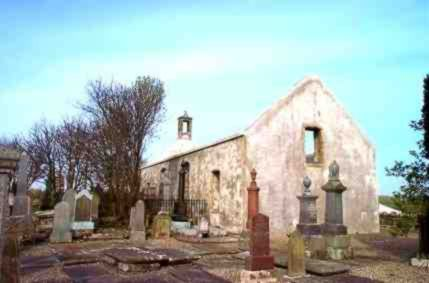 Halkirk, Caithness, Auld Kirk